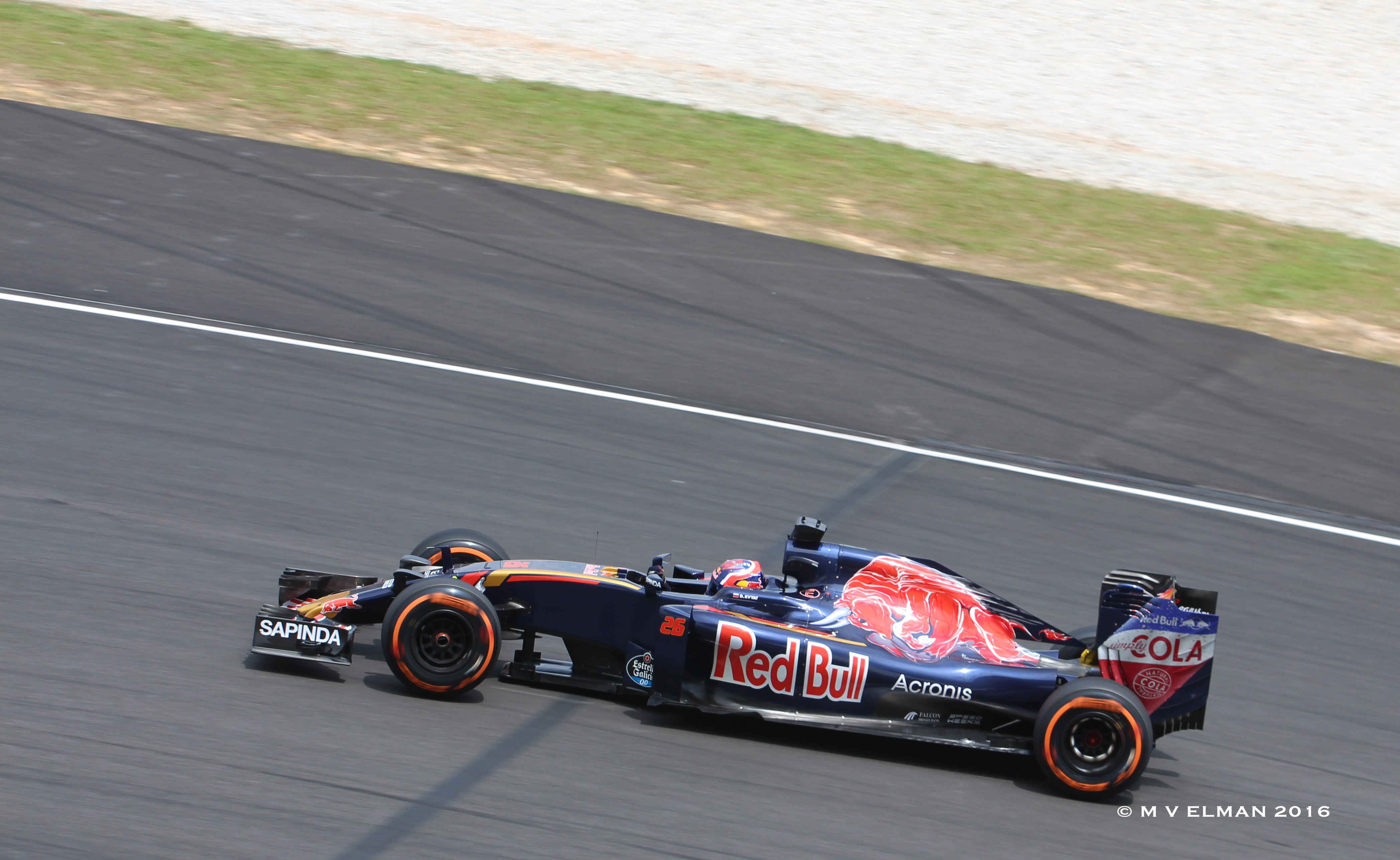 Daniil Kvyat - Scuderia Toro Rosso STR11